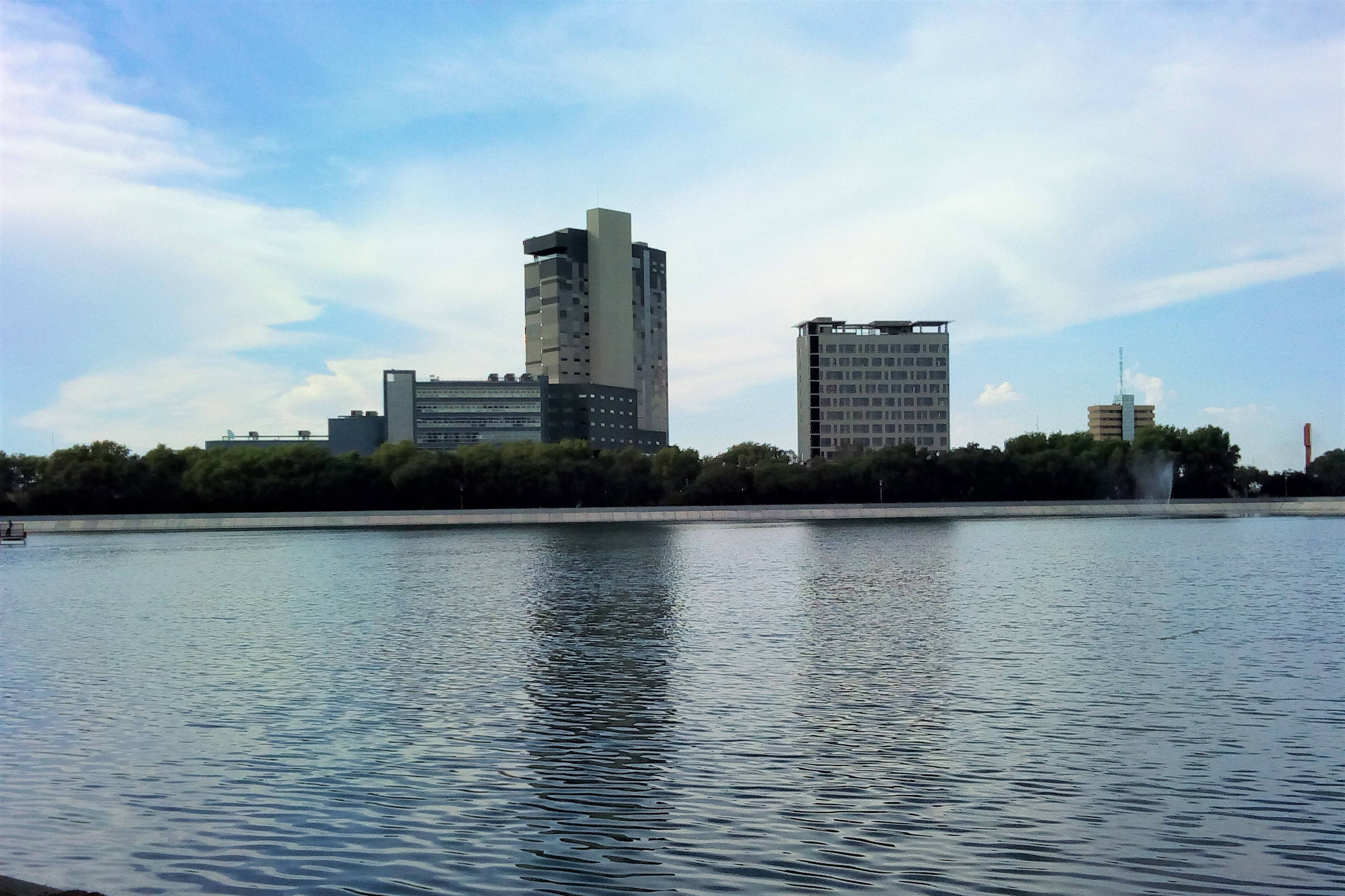 Lago mayor del Parque Tangamanga en junio 2018